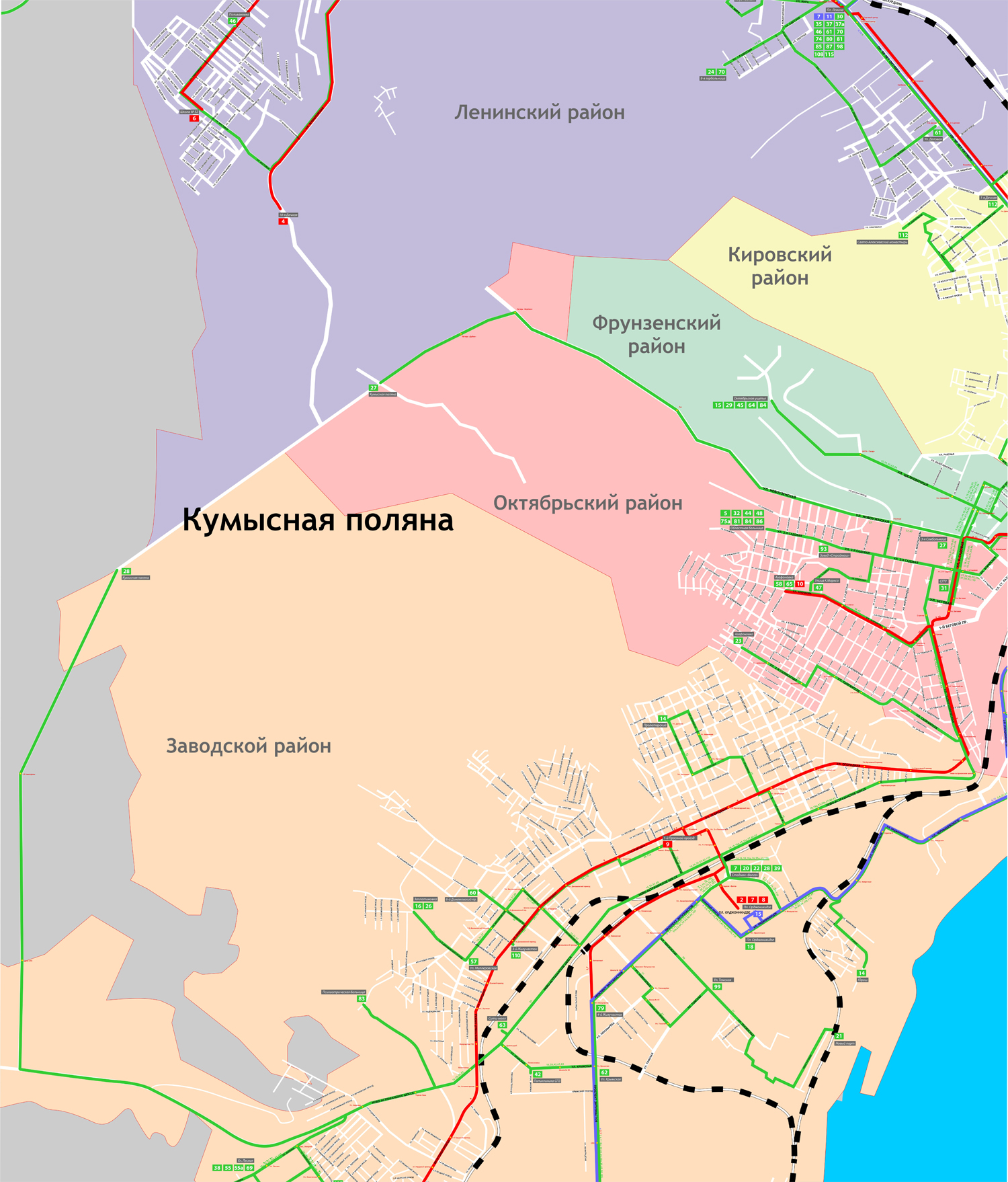 Карта Кумысной поляны.